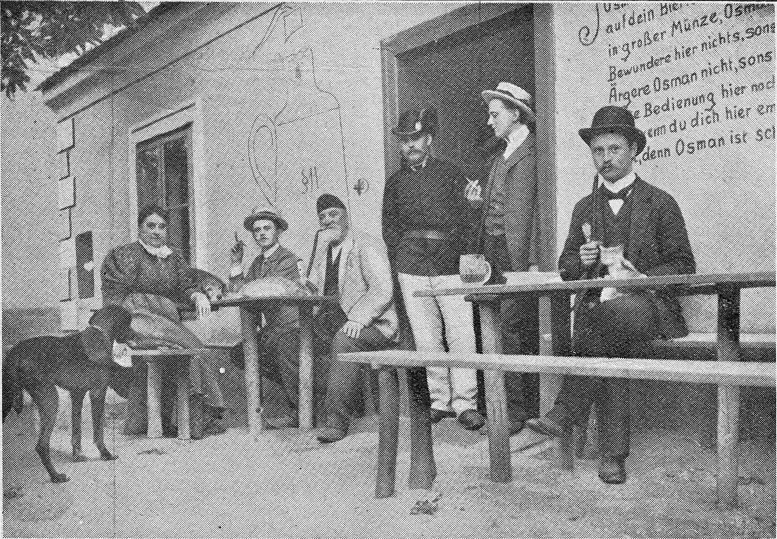 Bild von "Osman Pascha", das ist der studentische Spitzname für Moritz Milde den Wirt des Prager STudentenlokals "Schipkapaß" und seiner Ehefrau "Suleika"